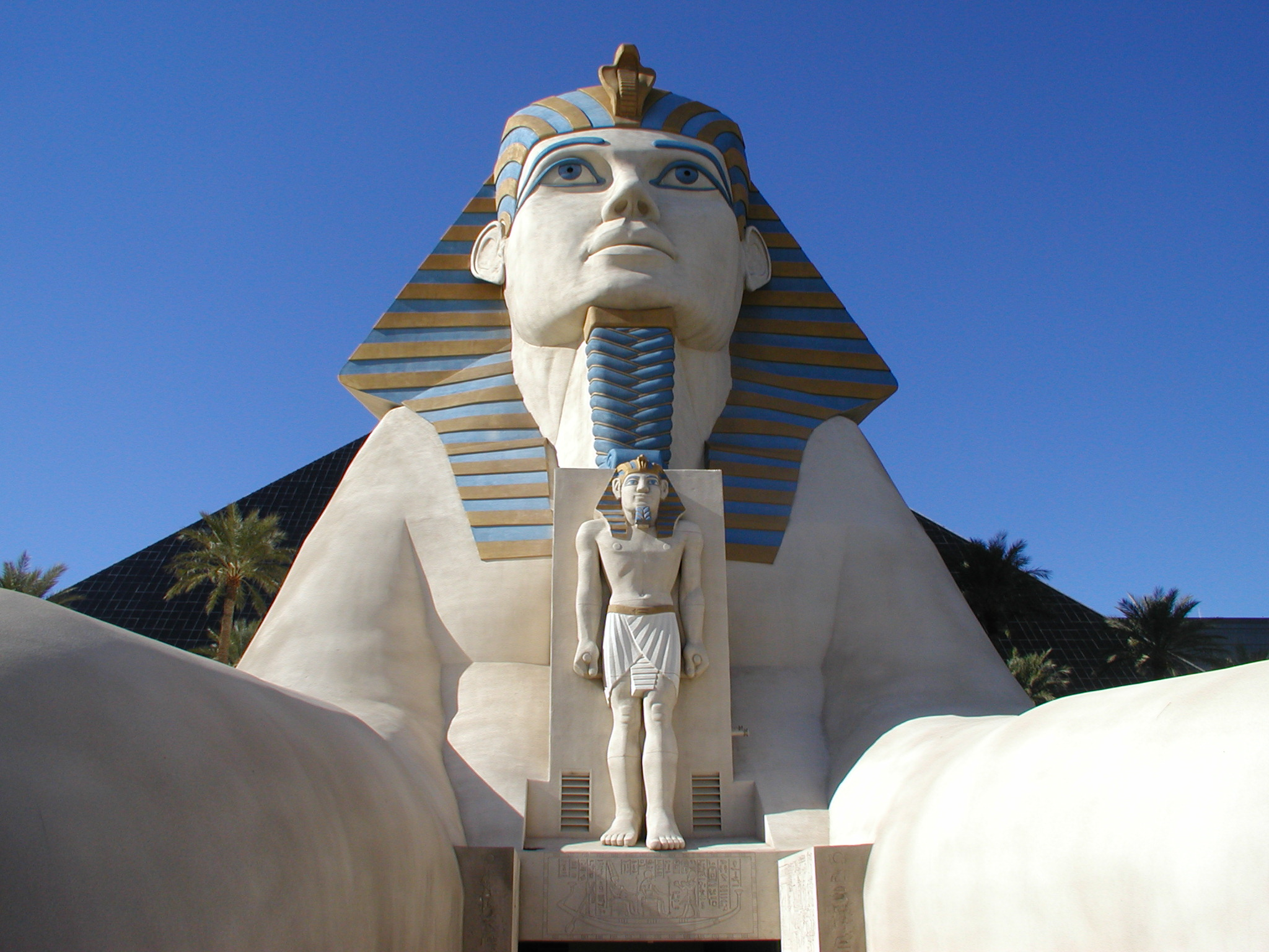 Foto tirada por mim (Vicente Sloboda) no começo de 2004. Na cidade de Las Vegas na Las Vegas Boulevard, mais conhecida como "STRIP". Nesta avenida ficam localizados os maiores cassinos da cidade.